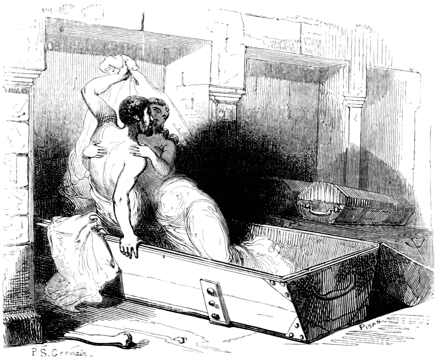 Le réveil Marthe et Maurice en l’an 3000.